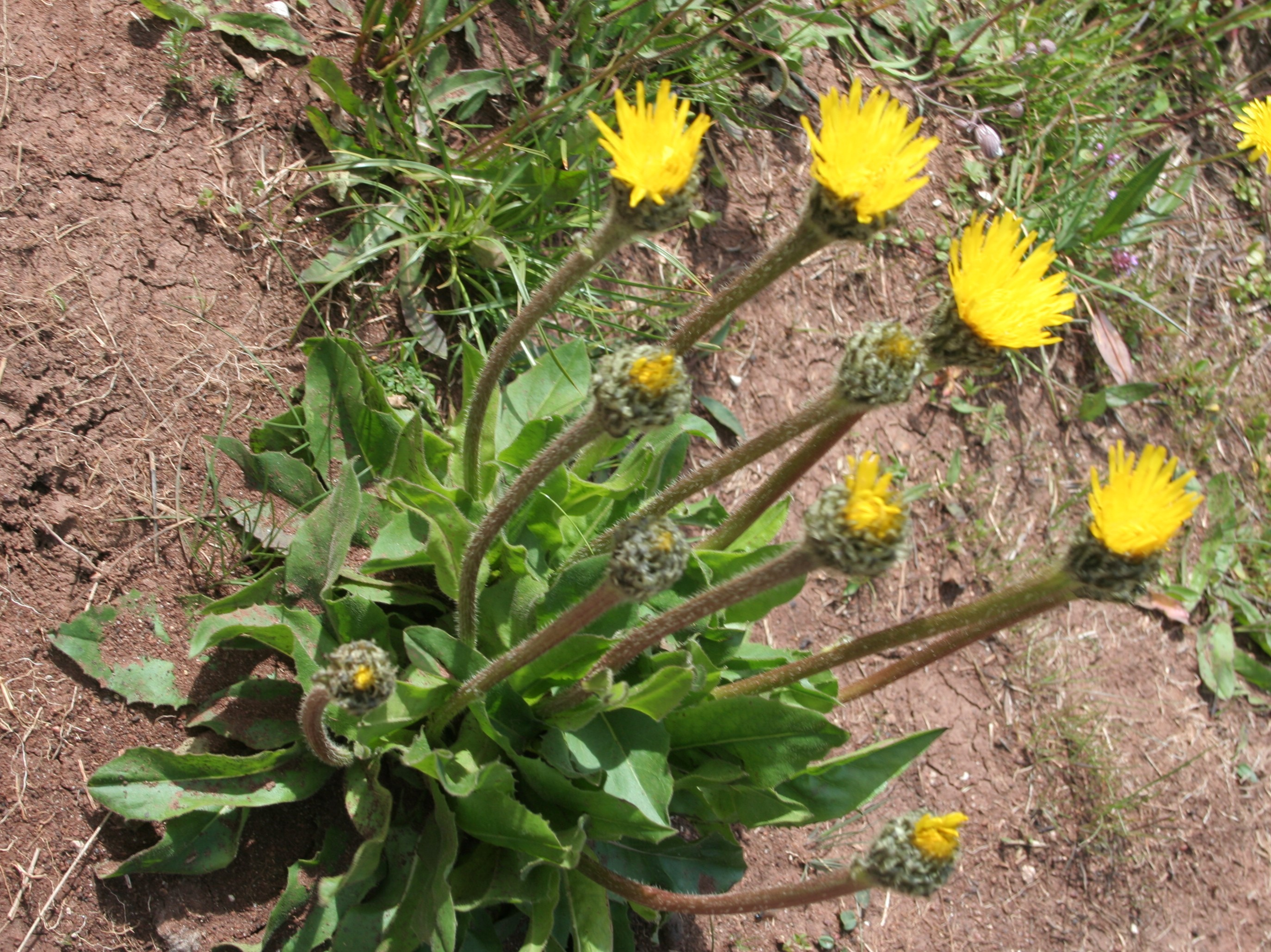 Hypochaeris_uniflora (Costolina alpina) Località : Passo di Falzarego, Cortina (BL), 2105 m s.l.m.